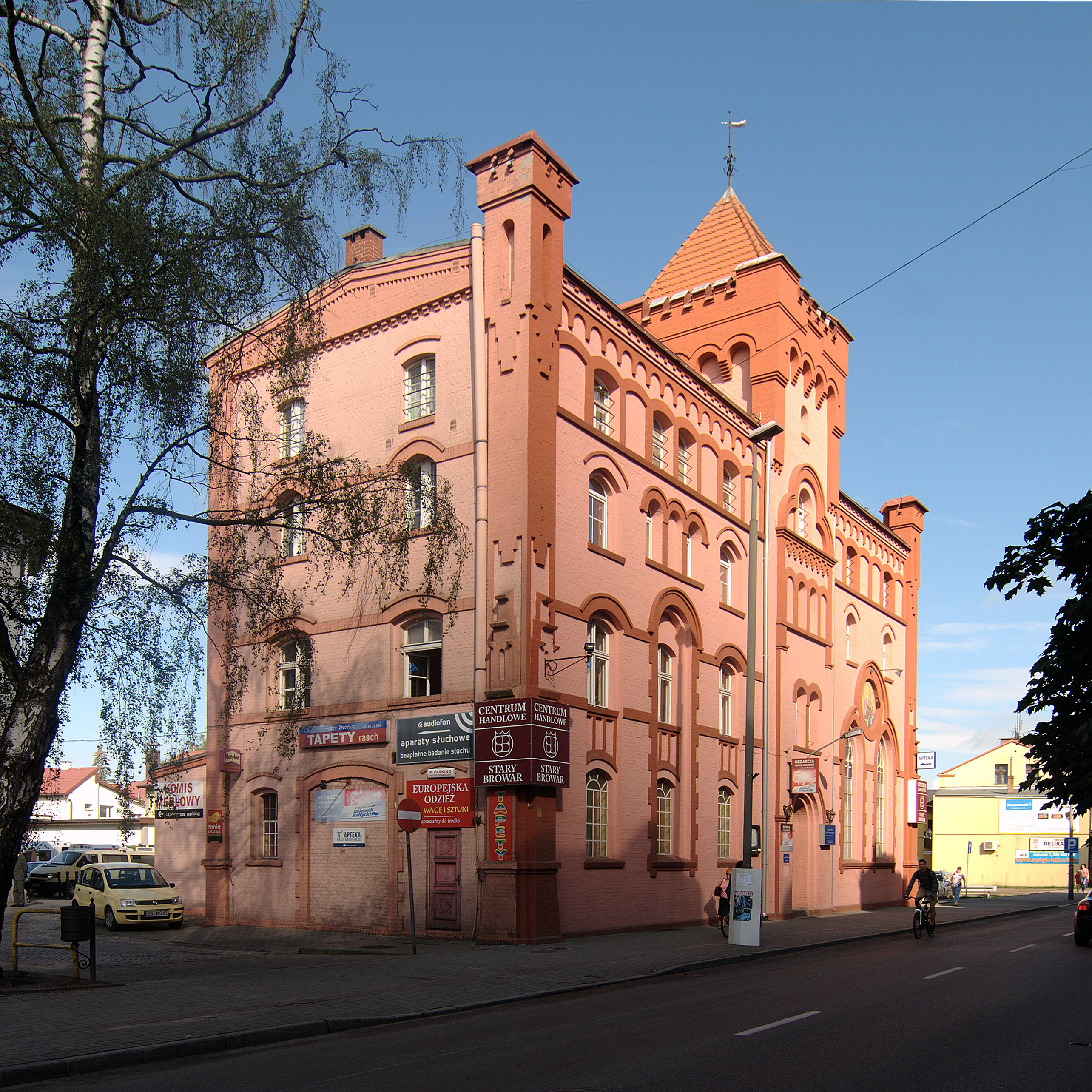 Lębork. Aleja Wolności. Stary Browar.